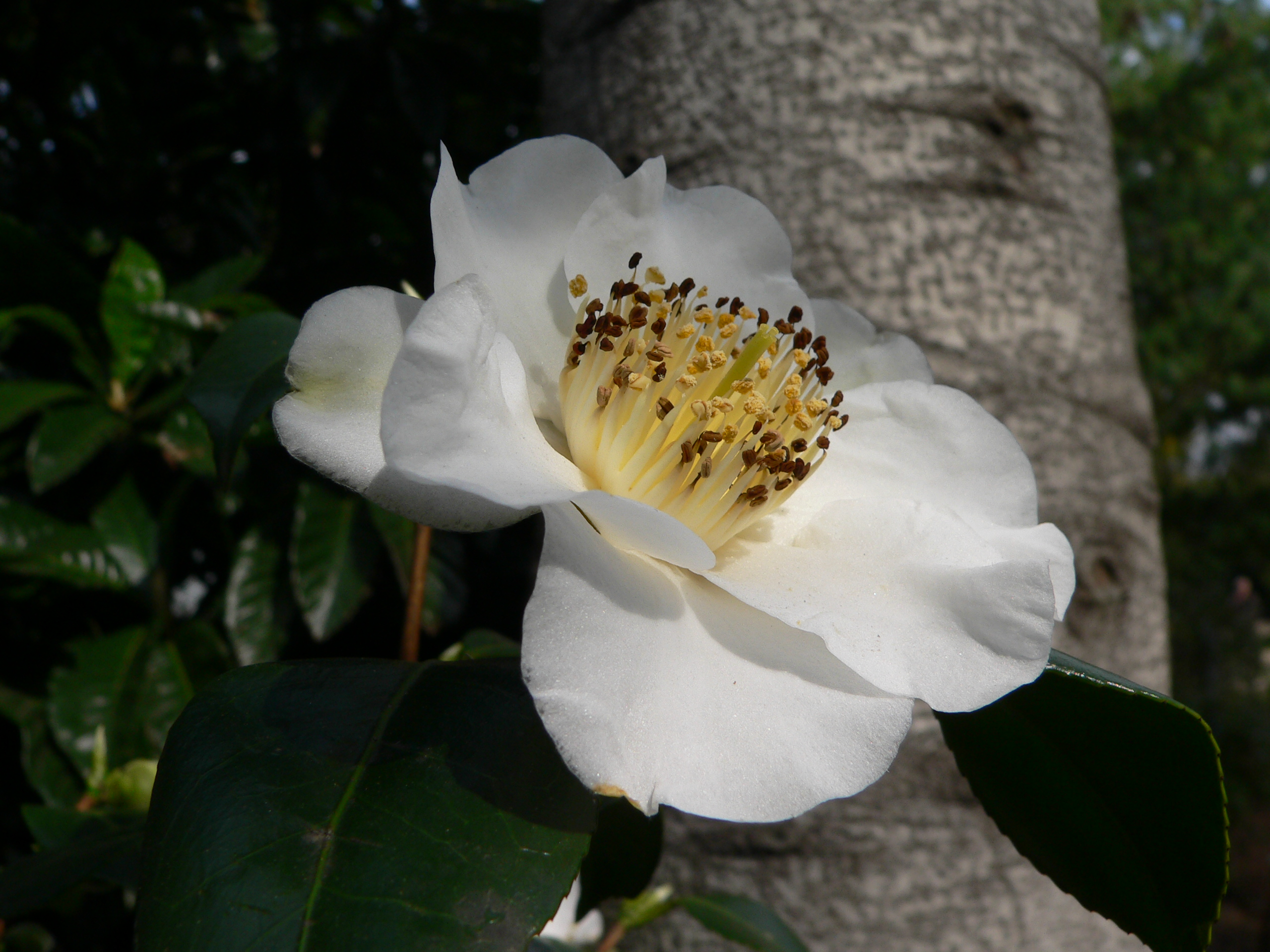 Camelia japonica